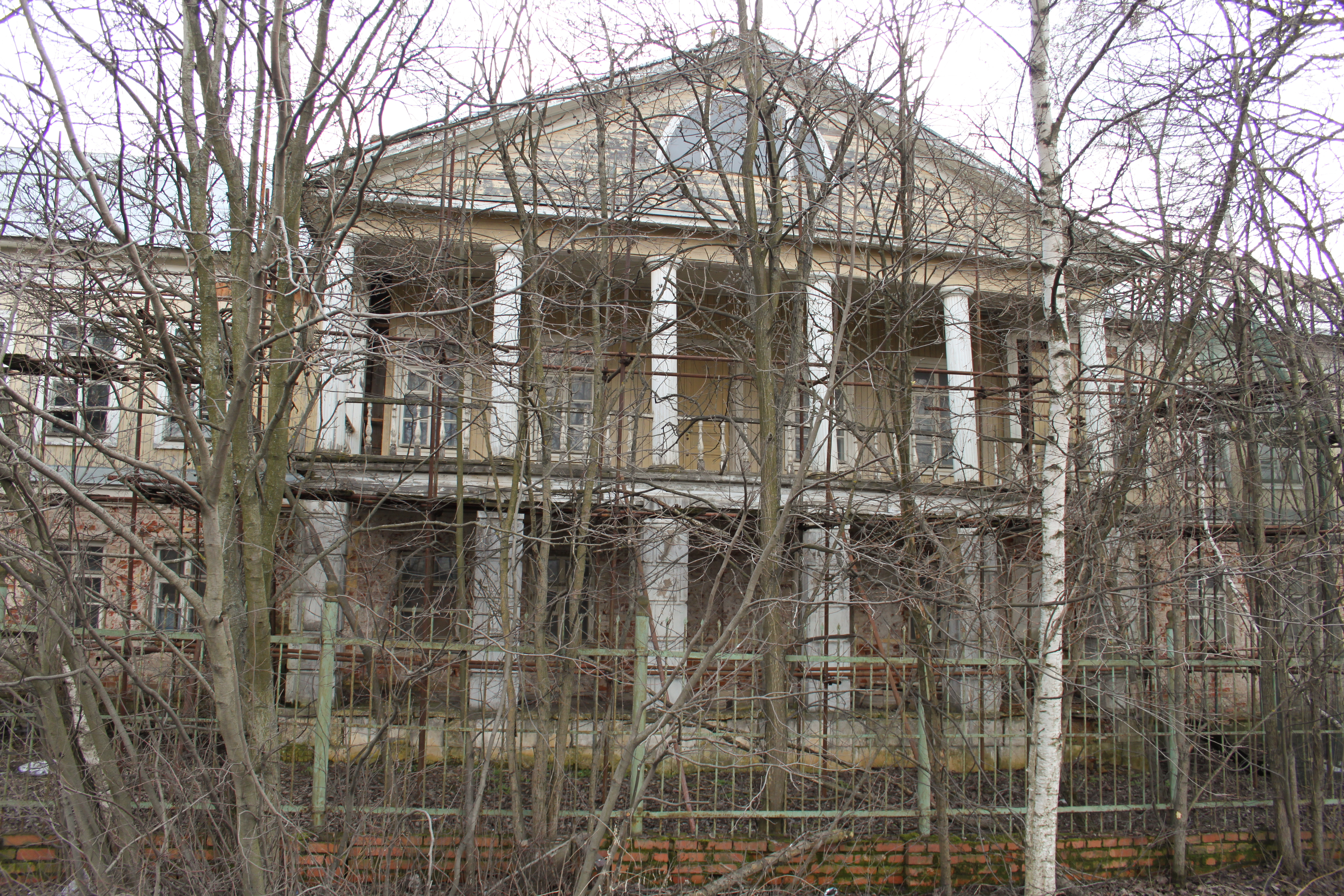 Дом Герцена (Главный дом): Перхушково, Одинцовский район, Московская область